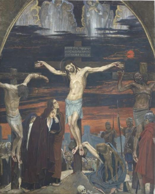 Васнецов Виктор Михайлович (Художник) Картина-икона "Голгофа". Период создания: 1905 г. Материал, техника: масло, холст Размер: 489 х 418 Место создания: — Номер в Госкаталоге: 2358031 Номер по ГИК (КП): КП-22554 Инвентарный номер: А-815-IV Местонахождение Федеральное государственное бюджетное учреждение культуры "Государственный музей истории религии"